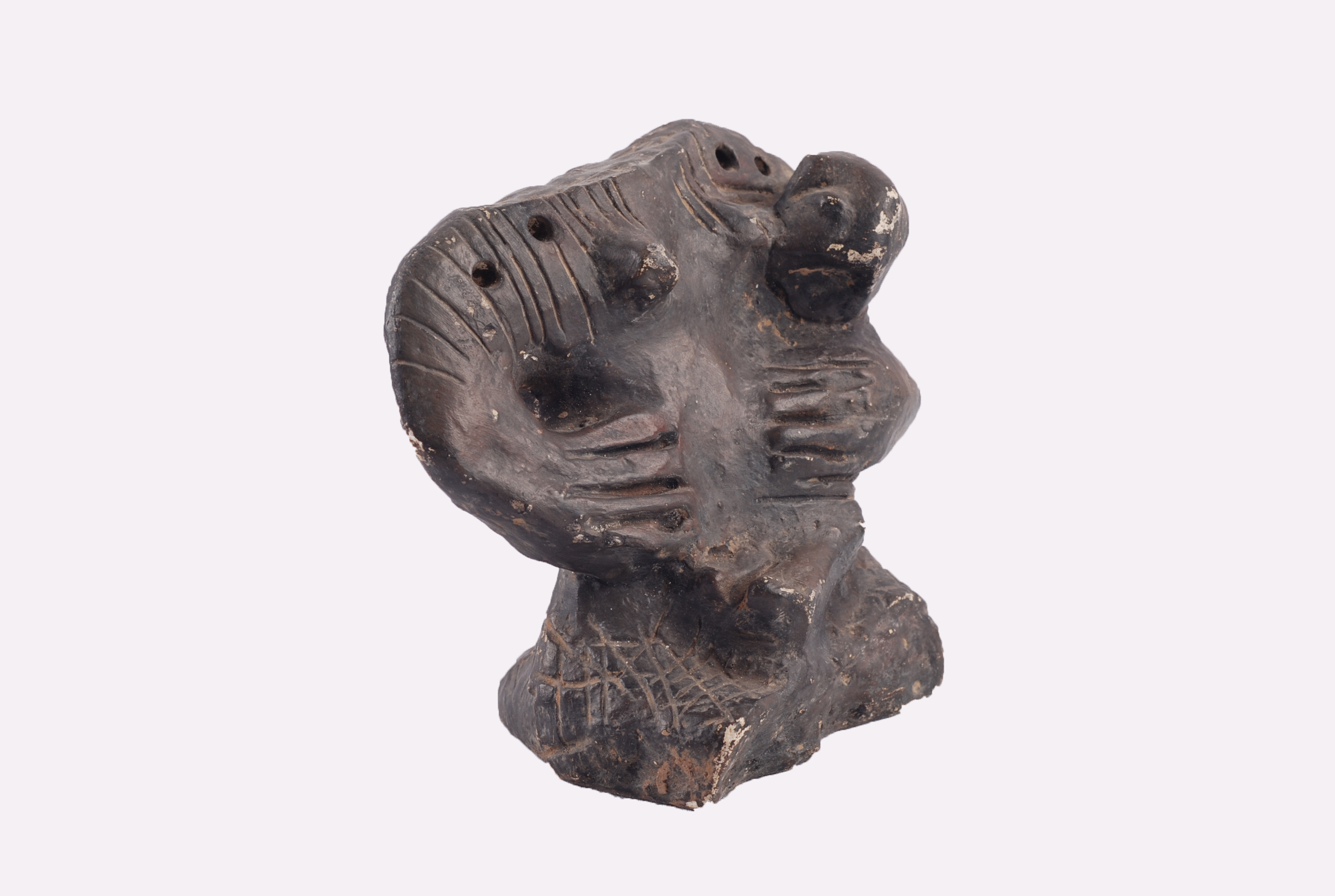 Srpski (latinica): Figurina majke sa detetom od gipsa iz perioda mlađeg neolita (5700-4700 g.p.n.e.). Pronađena iskopavanjima na lokalitetu Gradac u Zlokućanu. Deo je praistorijske zbirke Narodnog muzeja u Leskovcu.